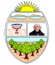 Escudo del municipio de Abasolo, Guanajuato.